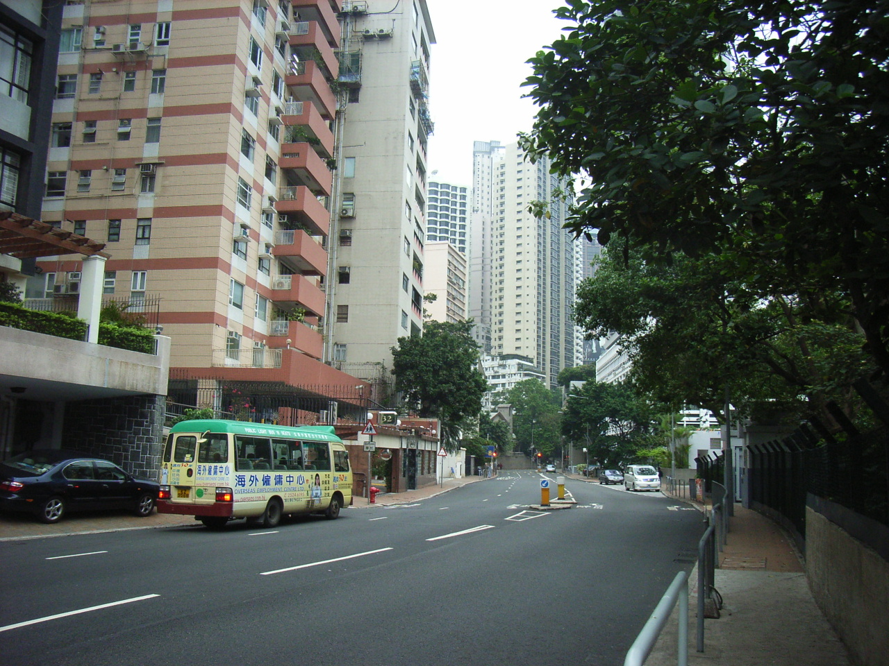 Hong Kong Visual Arts Centre 香港視覺藝術中心 香港中區堅尼地道7A